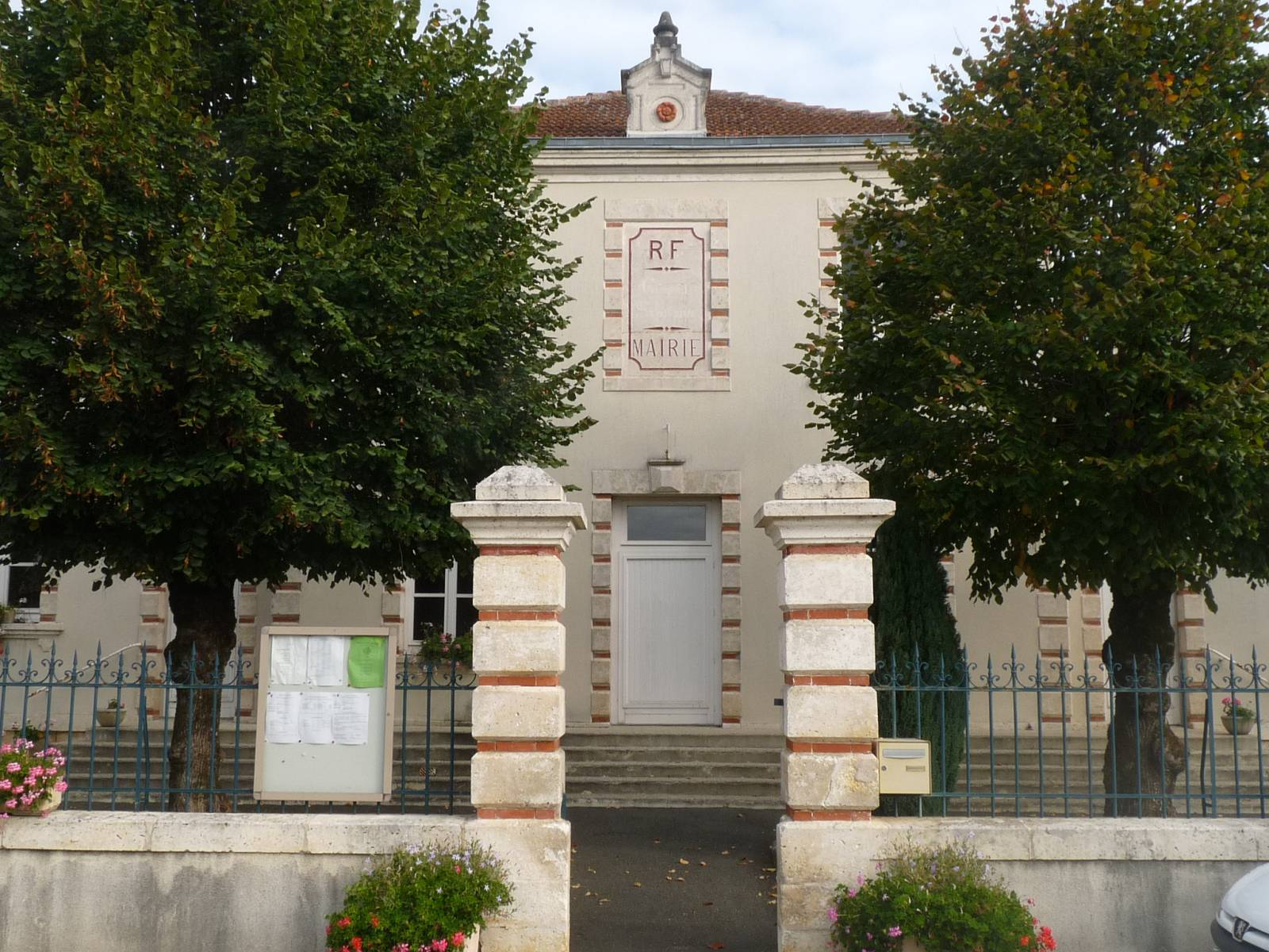 mairie de Beaulieu-sur-Sonnette, Charente, France